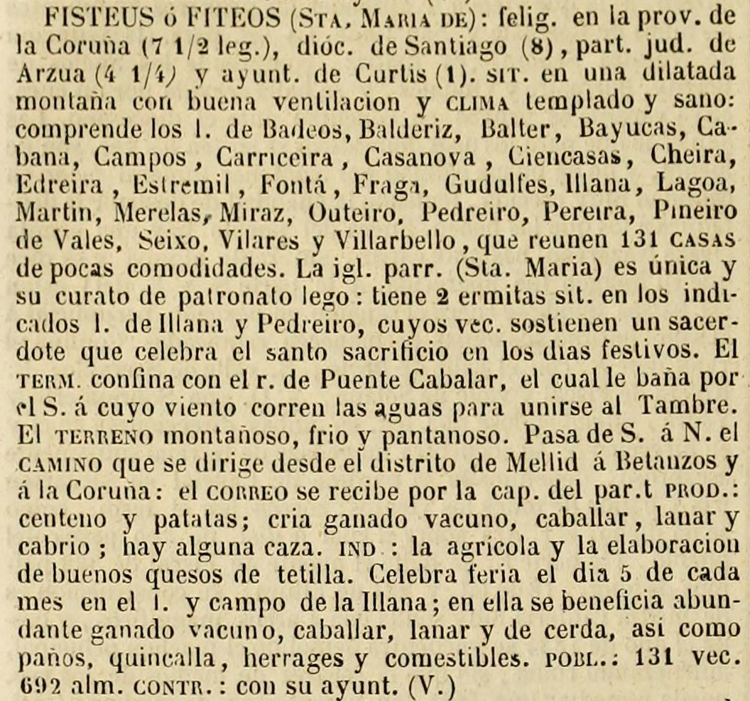 Fisteus no Diccionario geográfico-estadístico-histórico de España y sus posesiones de Ultramar.